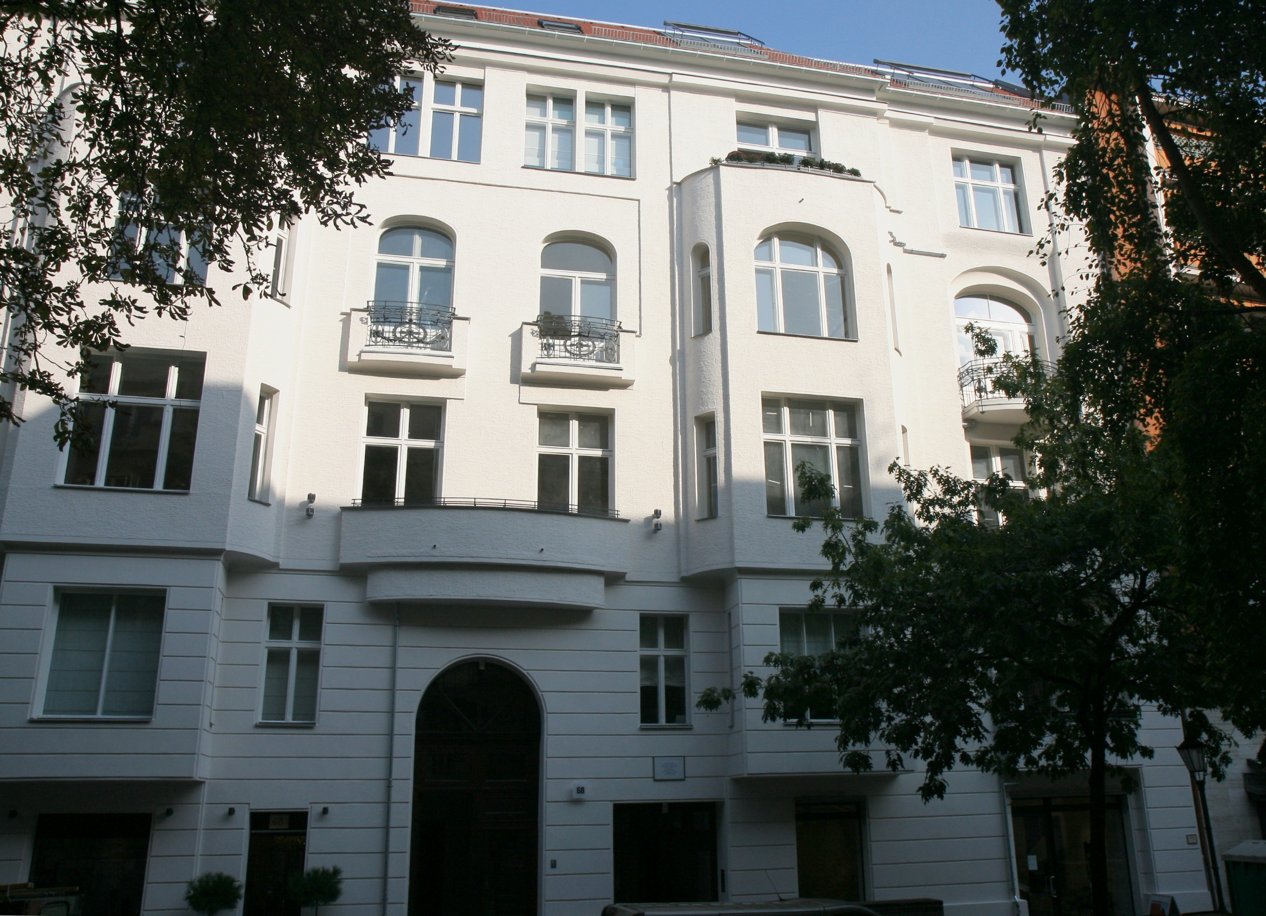 Mietshaus, 1899/1900 von Samuel Fritz Goldmann erbaut in Berlin-Charlottenburg, Fasanenstraße 68. Bestandteil des Ensembles Fasanenstraße 22–26, 28–30, 68–74.